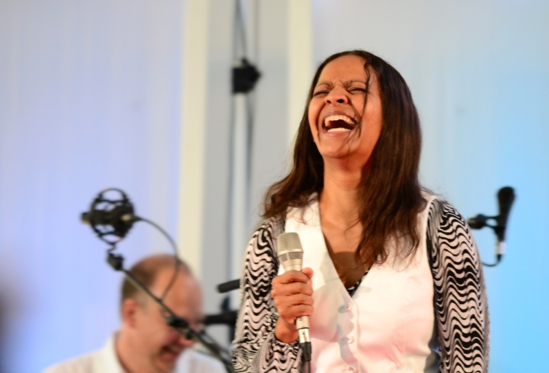 Felicia Touré - Konzert im Kunstraum, Bad Honnef